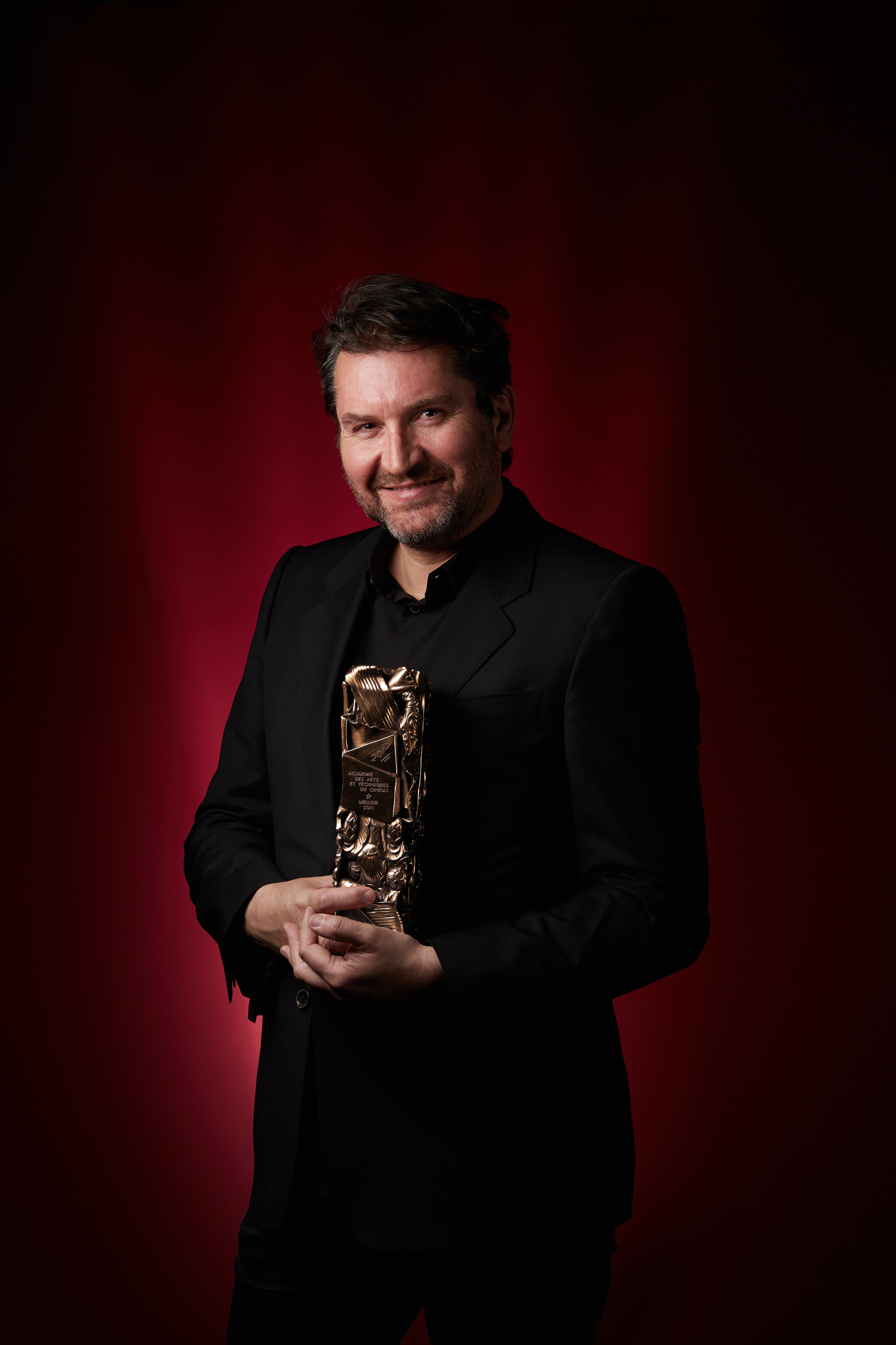 Jean Paul Hurier Cesar 2017 Meilleur Son pour l Odyssée